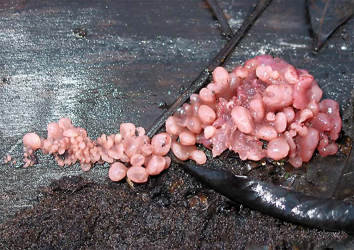 Ascocoryne sarcoides (Belgique/Belgium), forêt de hêtres et de chênes./ beeches and oaks forest. Auteur/Author : (user:Jean-Pol GRANDMONT) (Collection personnelle/Private collection). Document publié avec l'accord de l'auteur /Document published with the author agreement (Jean-Pol Grandmont). Date de la prise de vue/Capture date: Année/Year - Mois/Month - Jour/Day : 2005-02-28